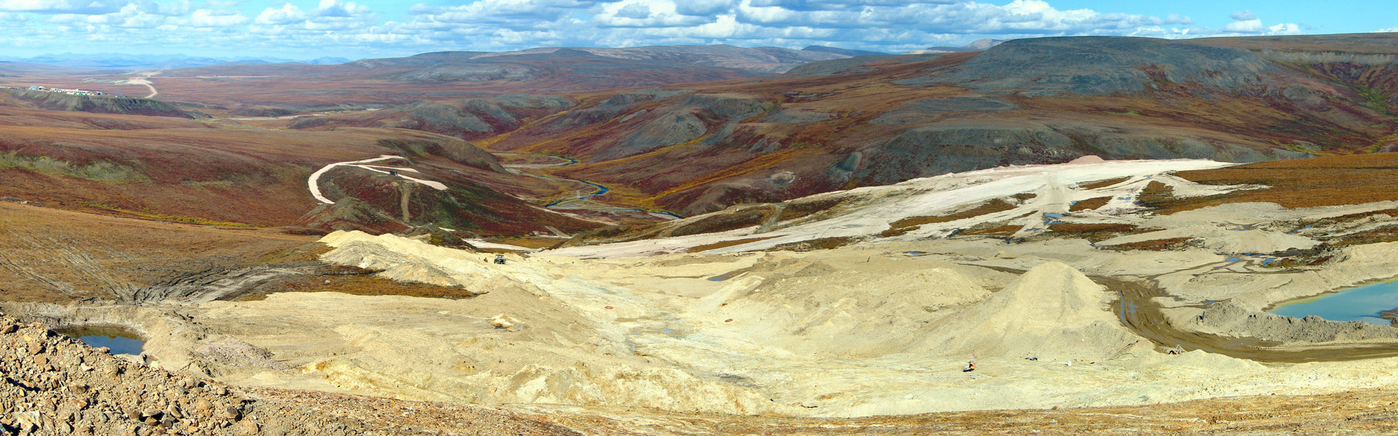 месторождение Купол, северный фланг